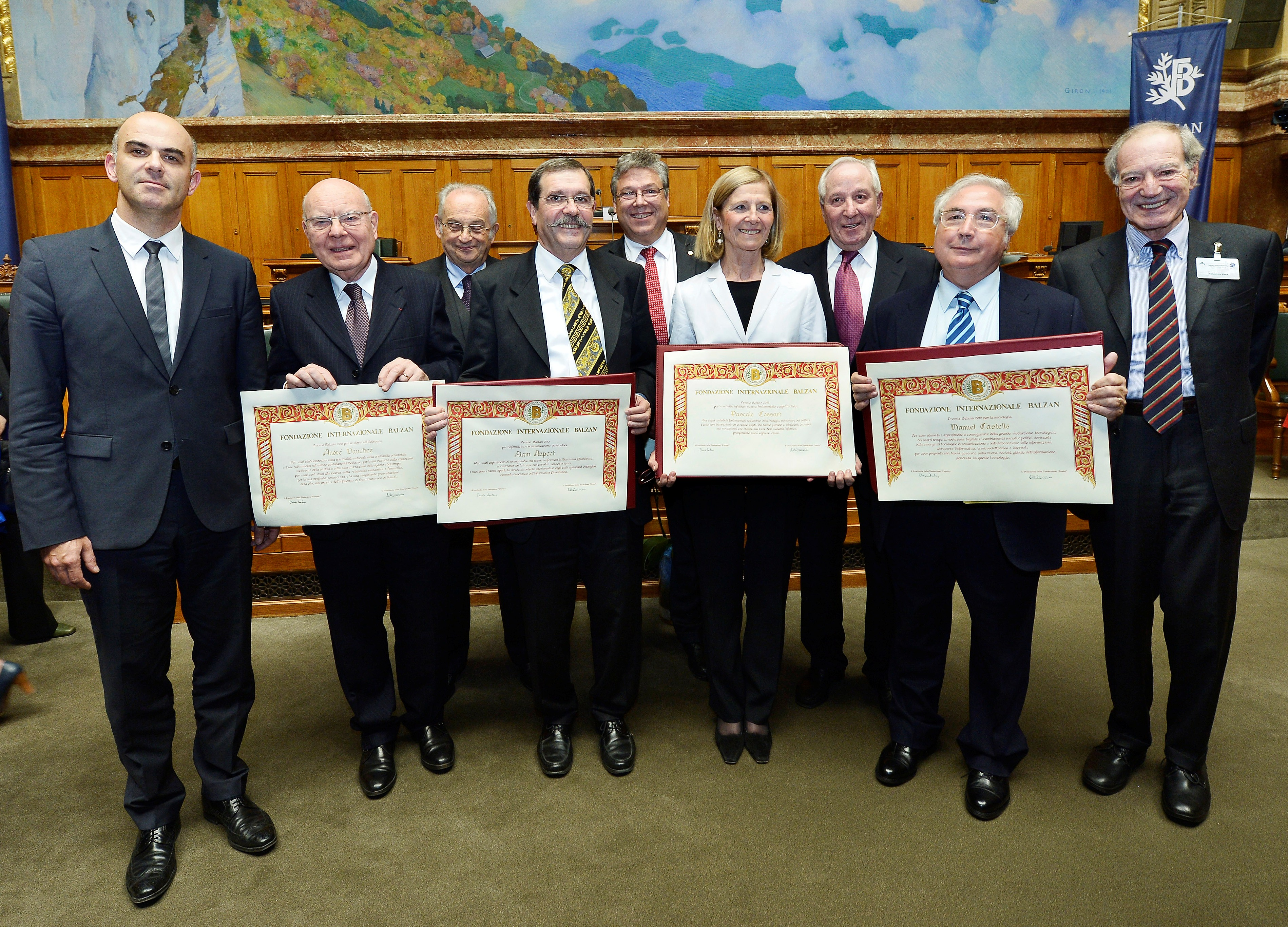 Cérémonie de remise des Prix Balzan 2013 à Berne (Suisse)